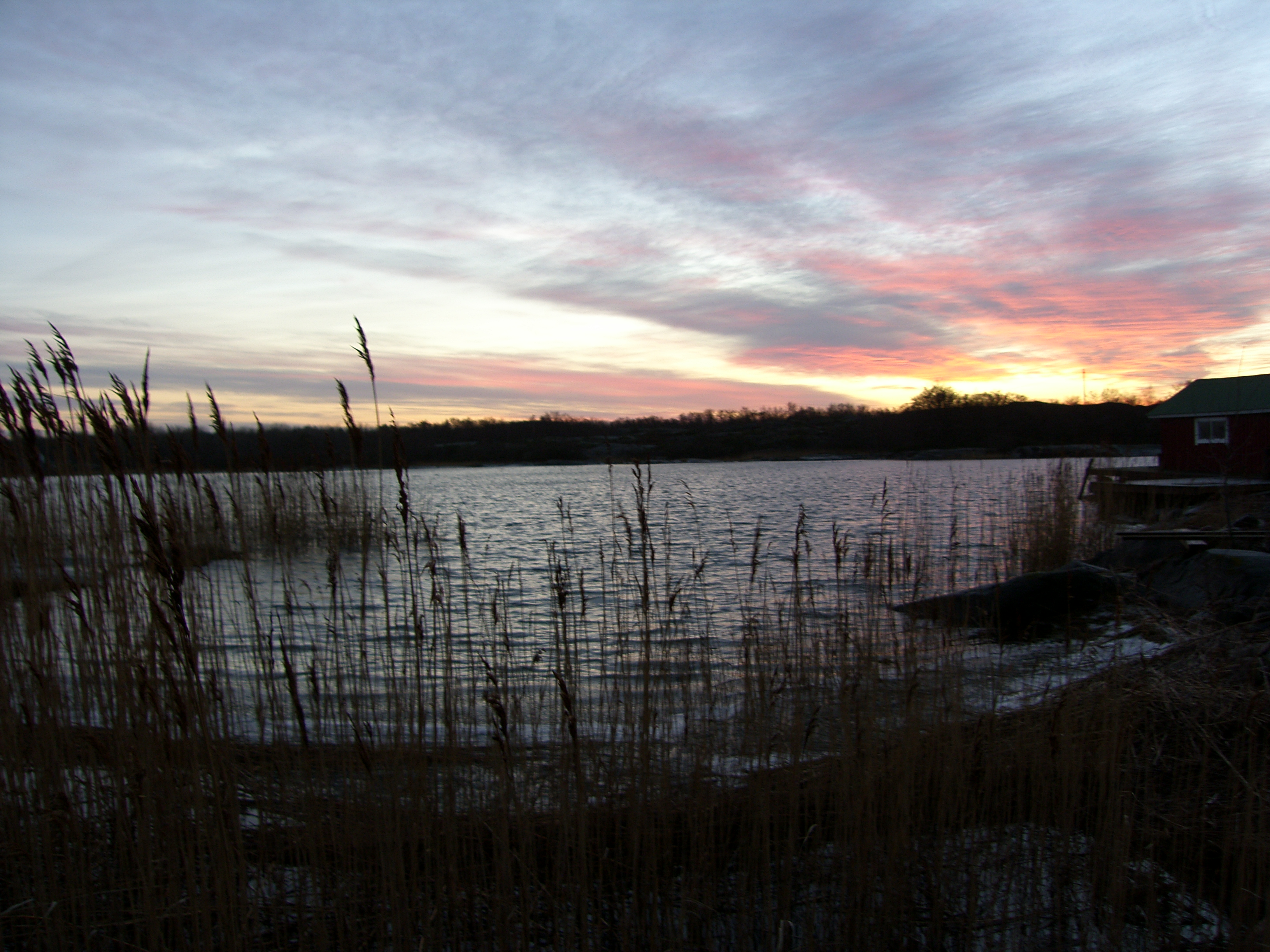 Landskab ved Kökar.